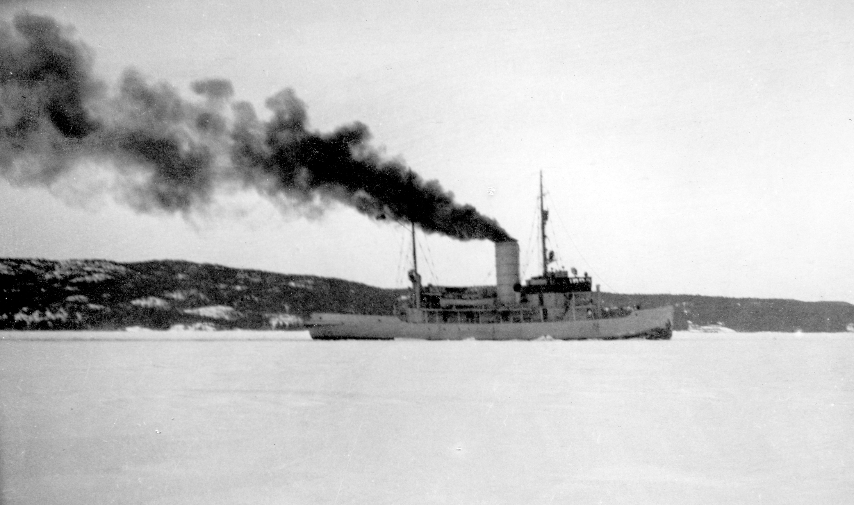 Bildet er hentet fra Arkivverket. Tysk isbryter i Frierfjorden mars 1942 Arkivinstitusjon : Statsarkivet i Kongsberg Arkivnavn : Telemark politikammer Sted : , , , Emneord: Skip, Hav, Båt, Tysk Avbildet